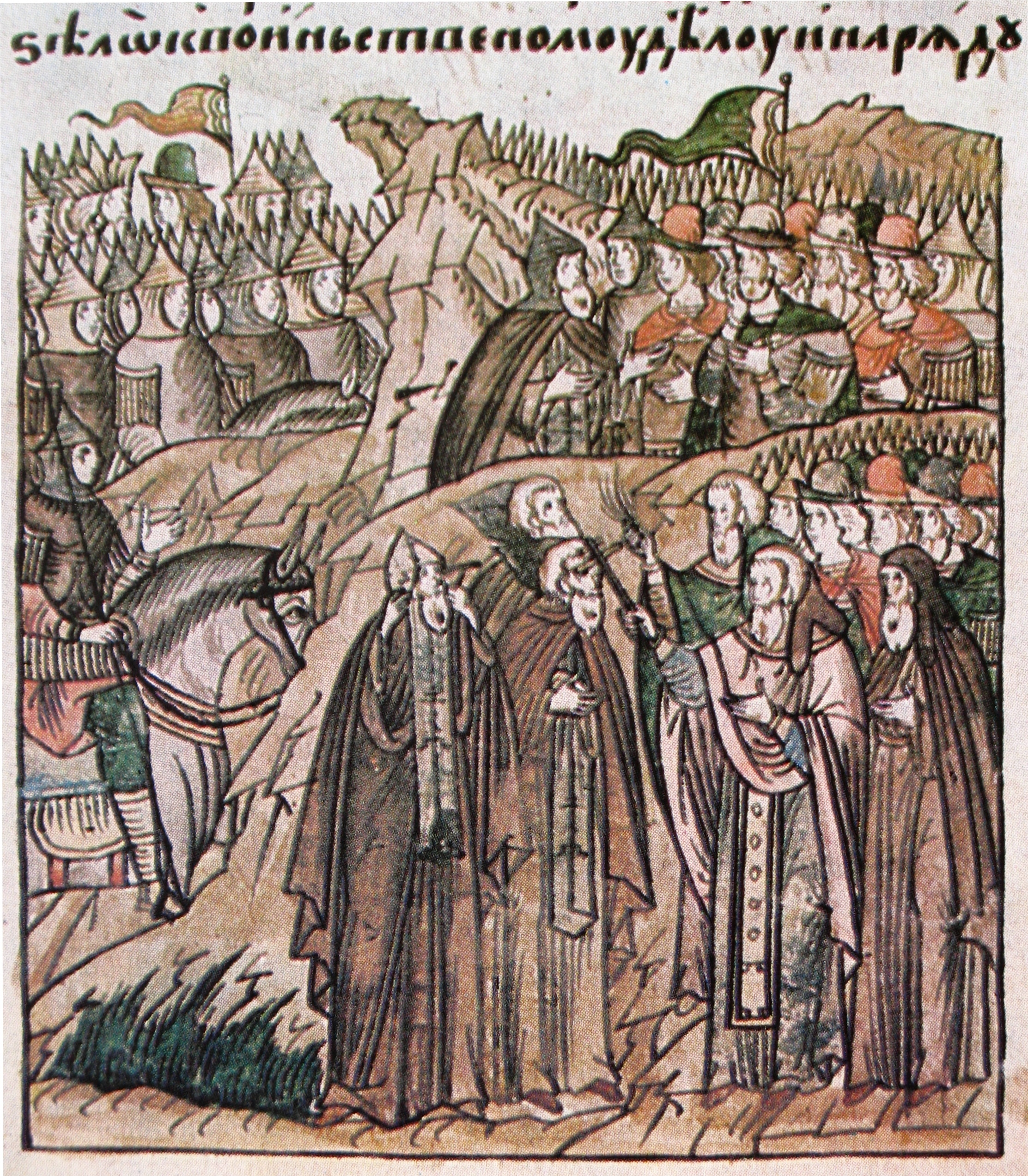 Миниатюра "Сергий Радонежский благословляет Пересвета перед Мамаевым побоищем" из Лицевого летописного свода Иоанна Грозного. Вторая половина 16 века. «Тогда же преподобного игумена Сергия Радонежского изящный его послушник инок Пересвет начал говорить великому князю и всем князям: „Нисколько о не сем смущайтесь, велик Бог наш и великая крепость от него. Я хочу Божиею помощию, и пречистой его матери, и всех святых его, и преподобного игумена Сергия молитвами с ним встретиться“. Был же сей Пересвет, когда в мире был, славный богатырь, великую силу и крепость имел, ростом и широтою плеч всех превосходил, и смышлен был весьма к воинскому делу» (Татищев. История Российская).